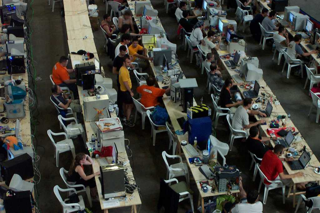 Euskal Encounter 2004. Image by Quique251.